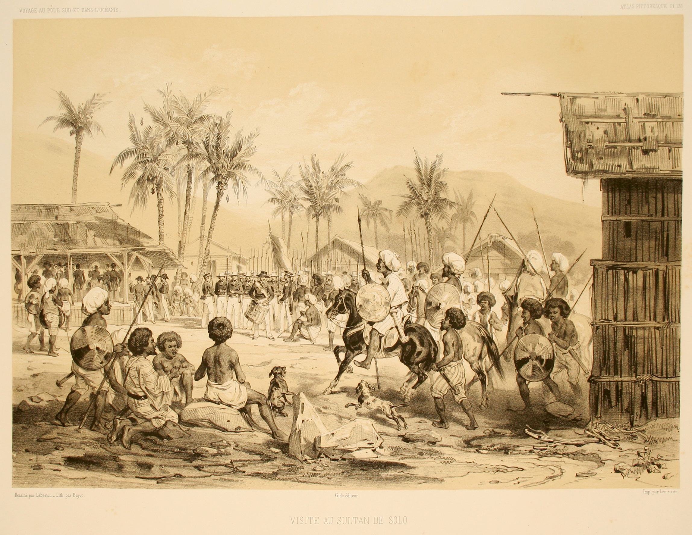 Visite au sultan de Solo. Atlas pittoresque, planche 138.